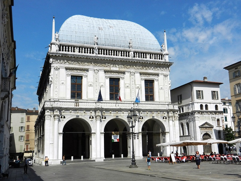 Brescia - Loggia